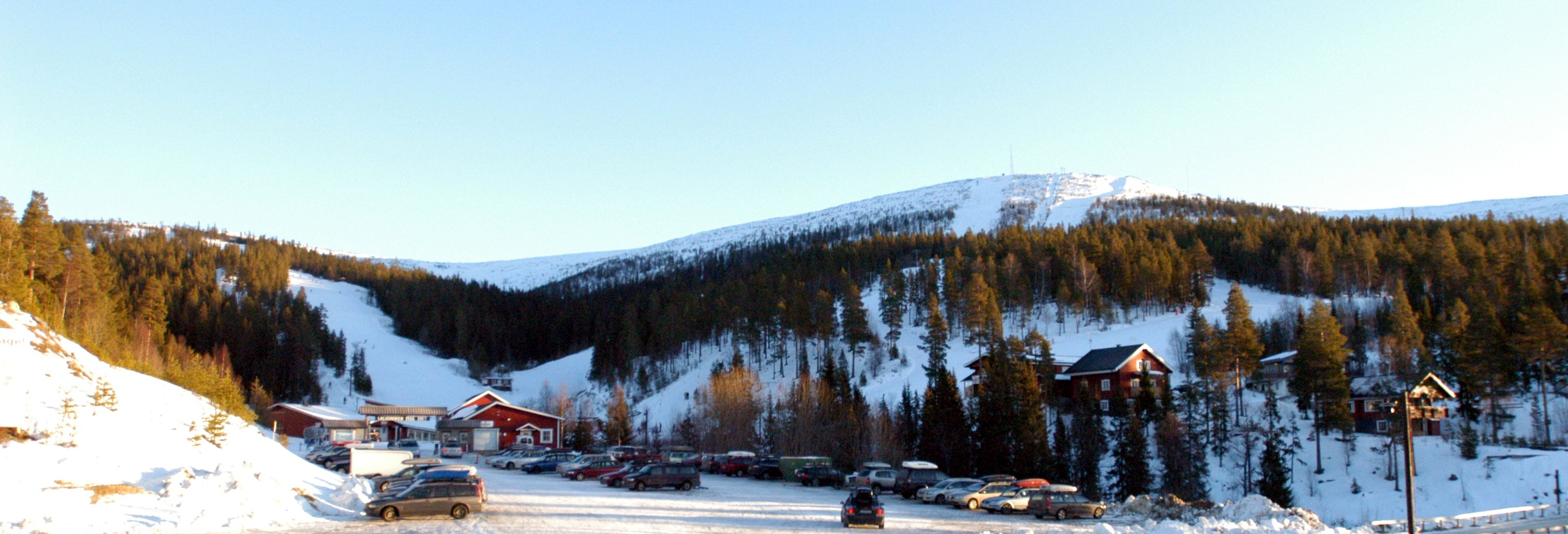 The skiresort Björnrike in Sweden.